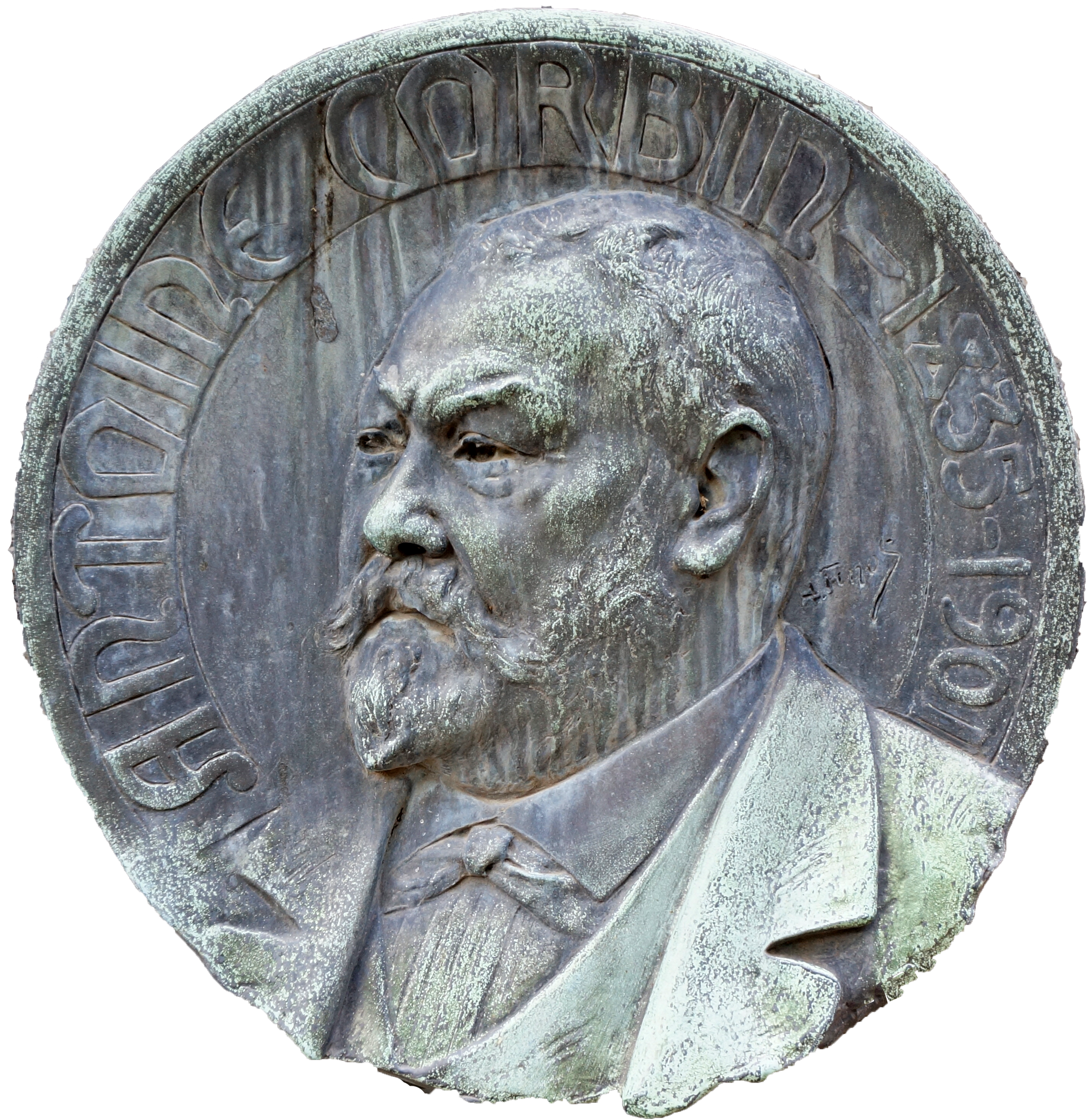 Présent au Cimetière de Préville.